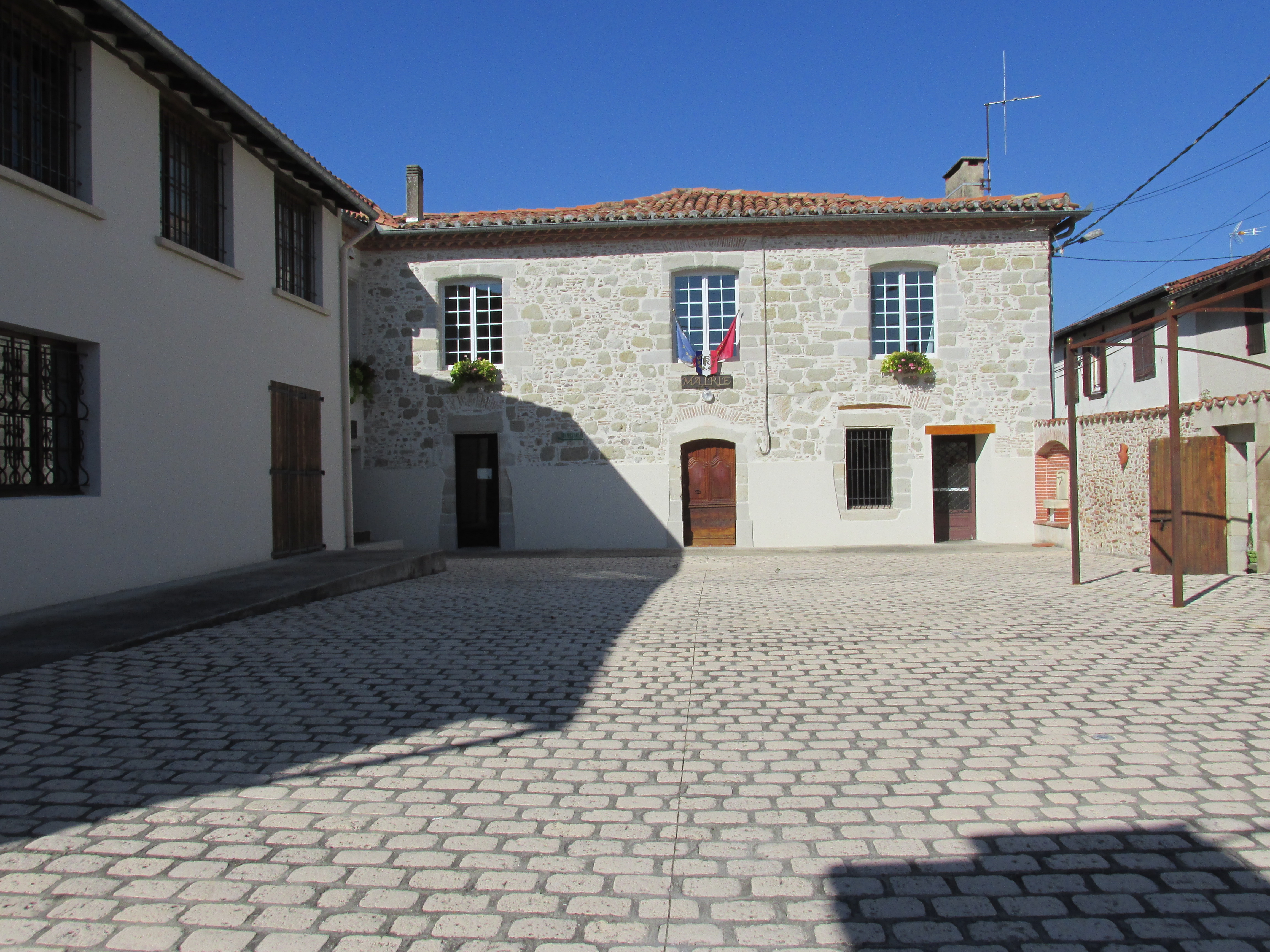 La cour de la Mairie